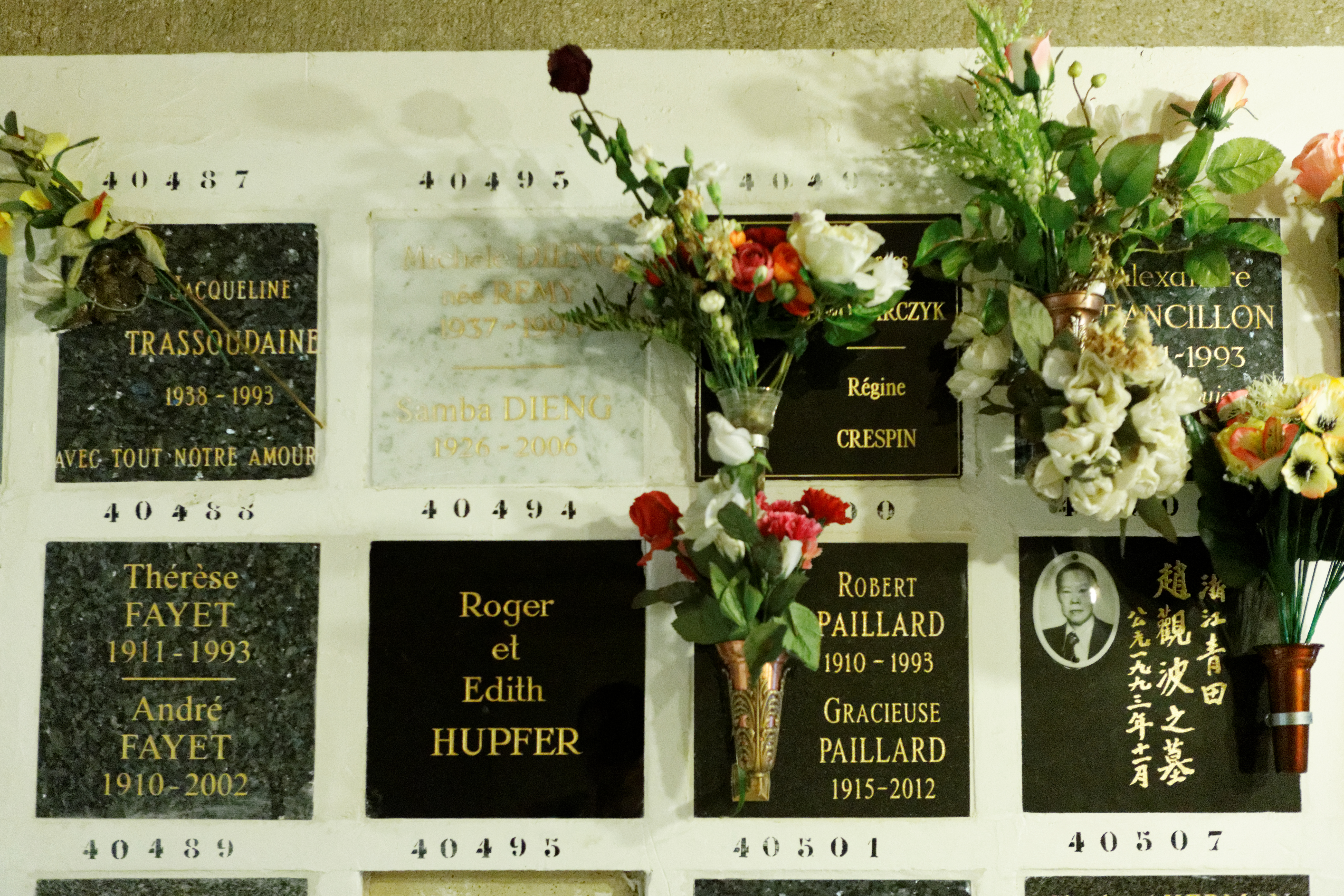 Cases du columbarium du cimetière du Père-Lachaise.